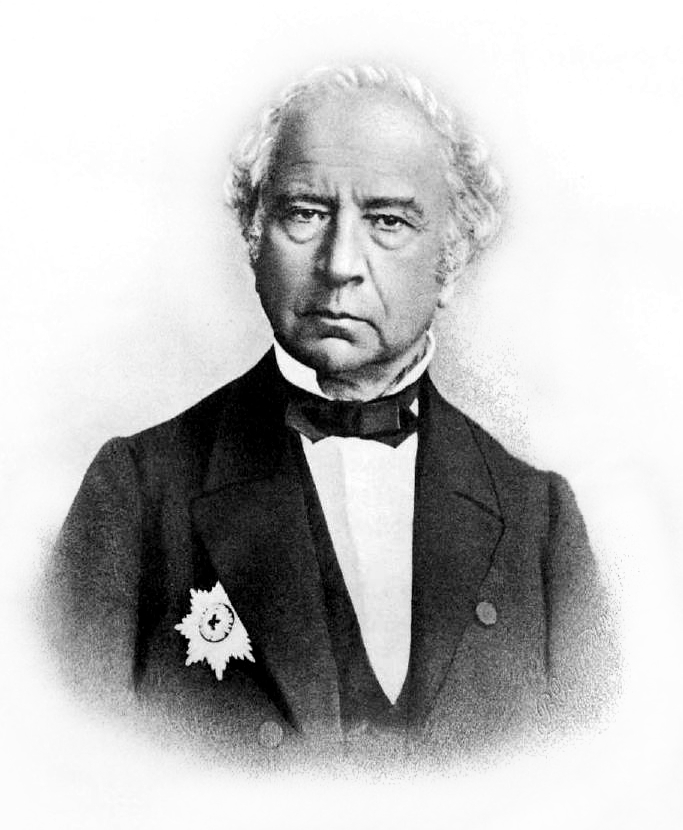 Адольф Яковлевич Купфер (Adolph-Theodor Kupffer) — академик, крупнейший физико-химик, метролог, основатель первого метрологического и поверочного учреждения — Депо образцовых мер и весов и Главной физической обсерватории России.